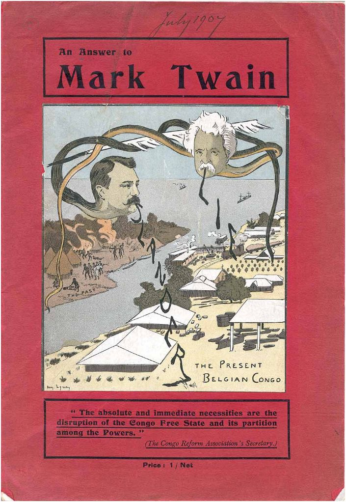 Front cover of An Answer to Mark Twain, anonymously published in Brussels (1907) in reply to King Leopold's Soliloquy. Pictured are Mark Twain and E. D. Morel.